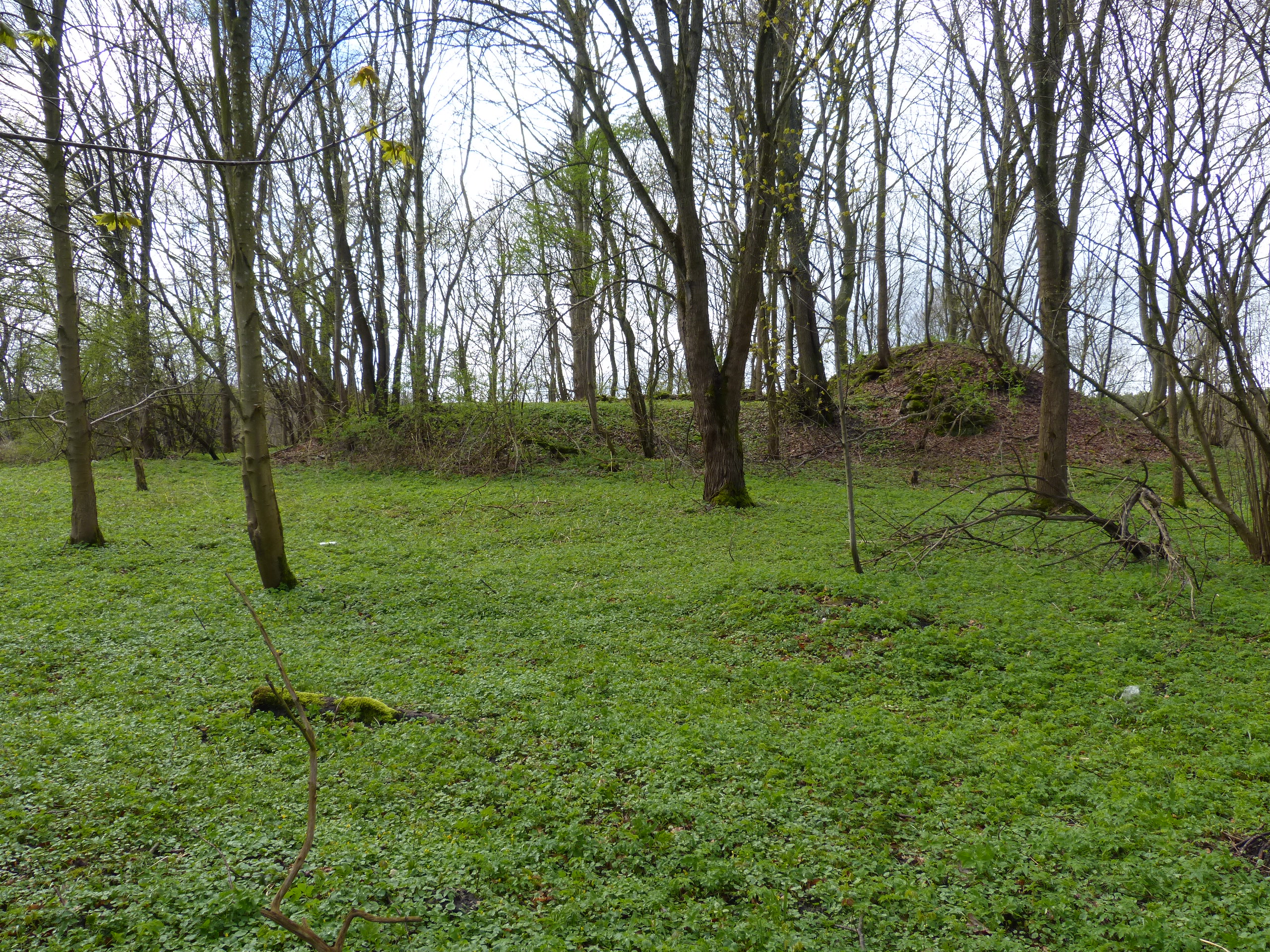 Gesamtansicht II